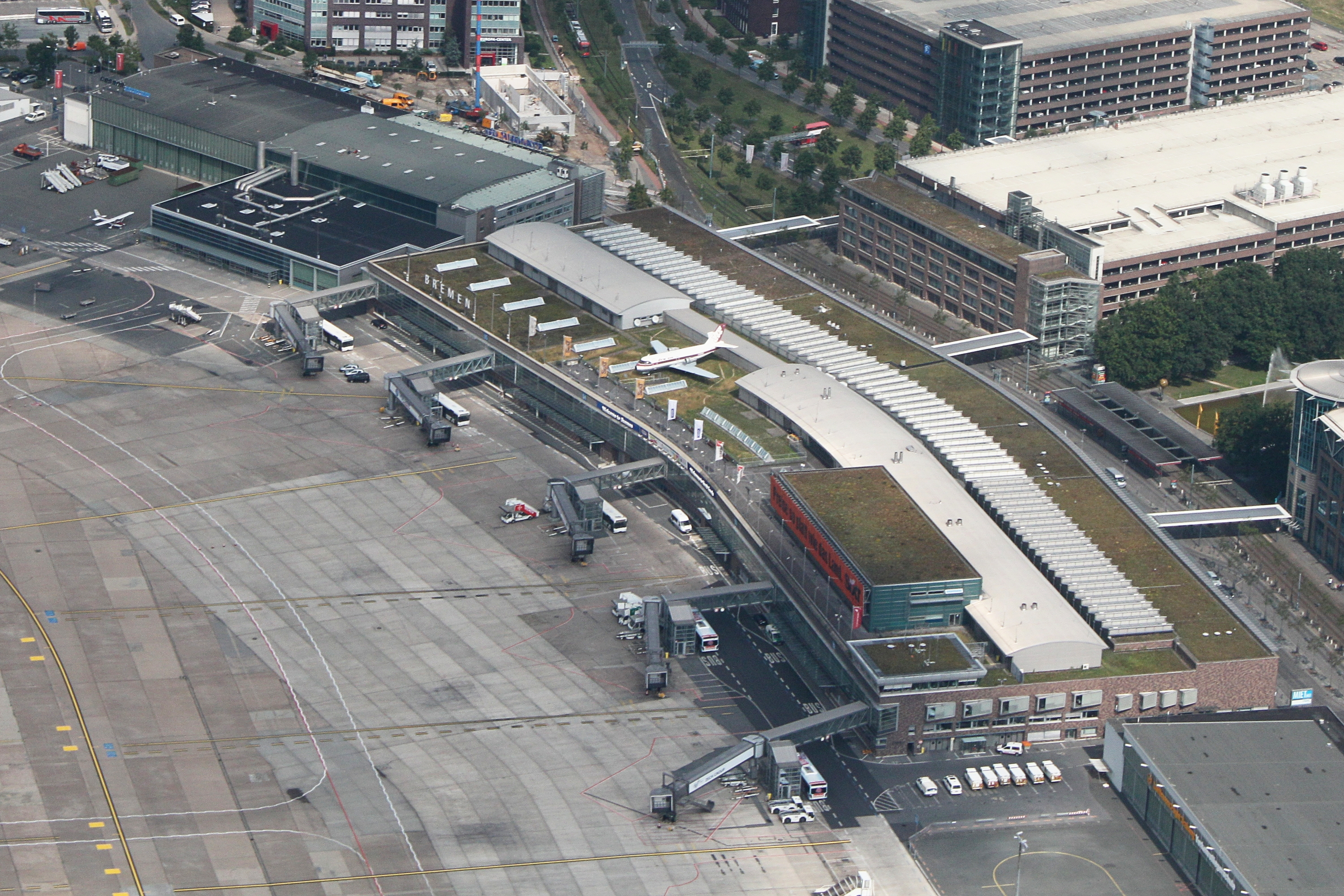 Flughafen Bremen; Bremen; Stadtteil: Neustadt Bremen; Ortsteil Neuenland; Airportstadt